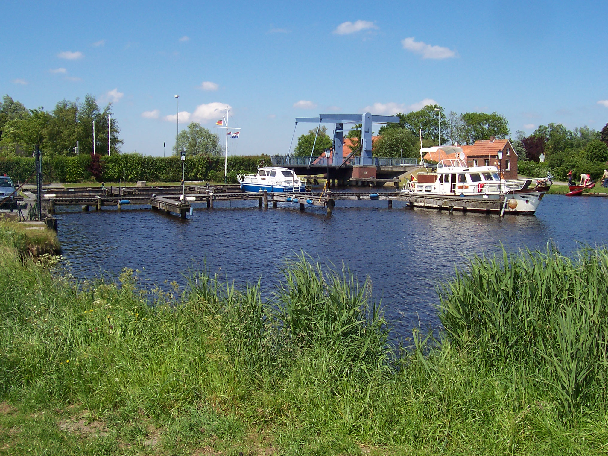 Bootshafen Dykhausen